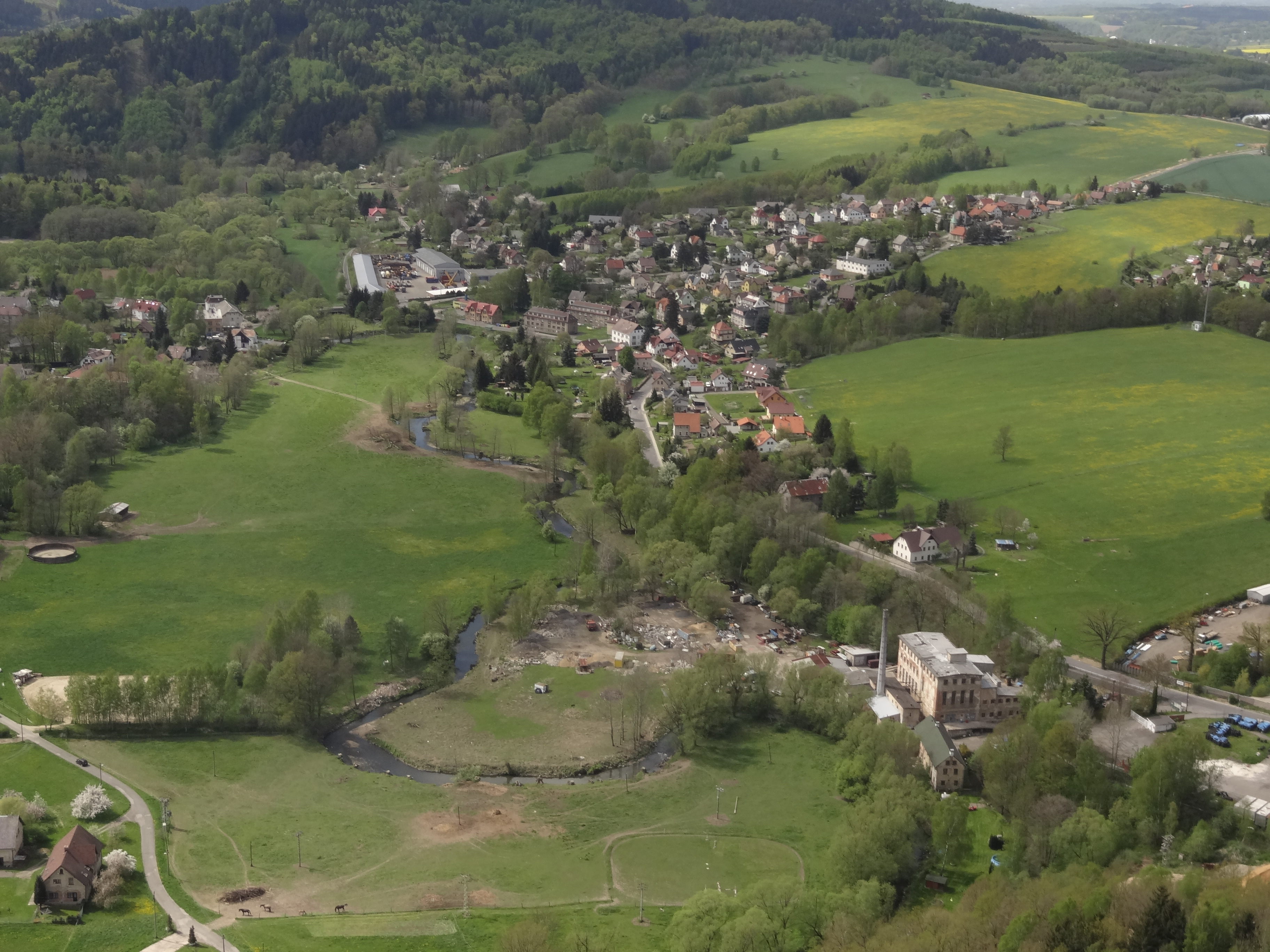 Machnín z letadla